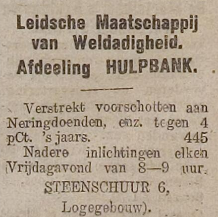 30 november 1920